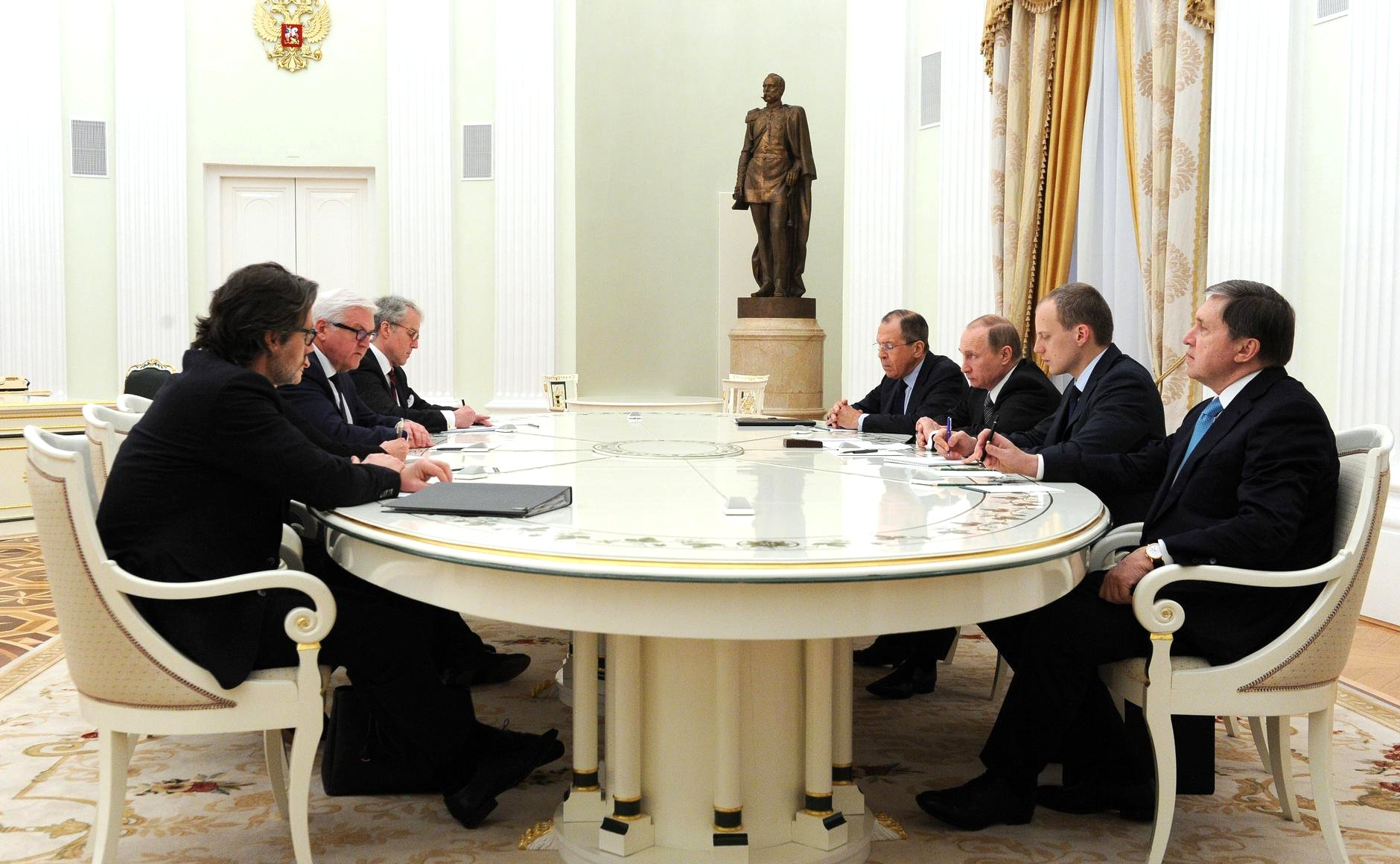 Встреча Президента России Владимира Путина с Министром иностранных дел Германии Франком-Вальтером Штайнмайером